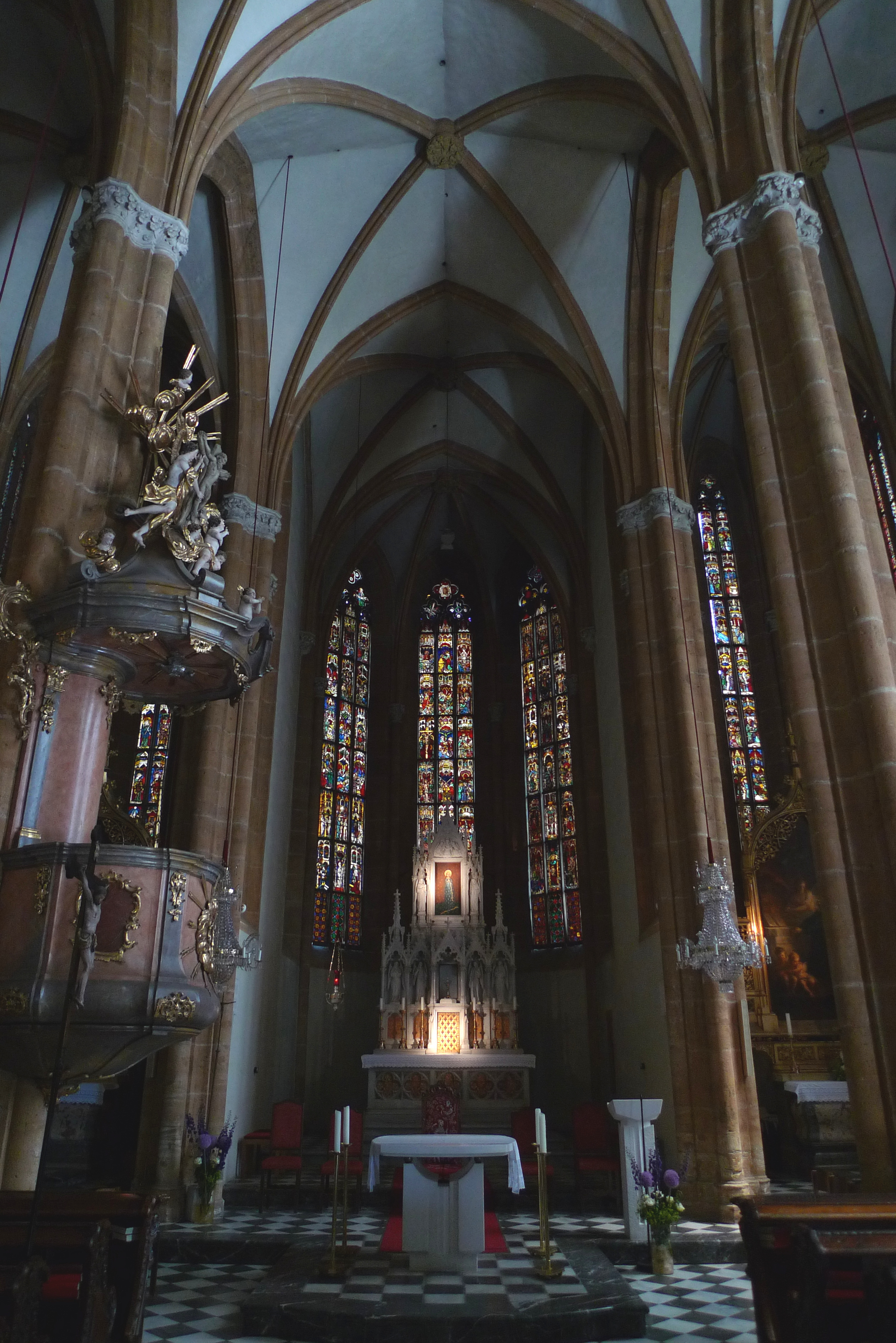 Innenraum der dreischiffigen Wallfahrtskirche Maria Straßengel 2012; eigene Aufnahme des Autors